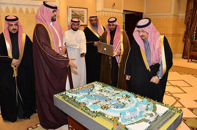 مشروع تجاري في الرياض